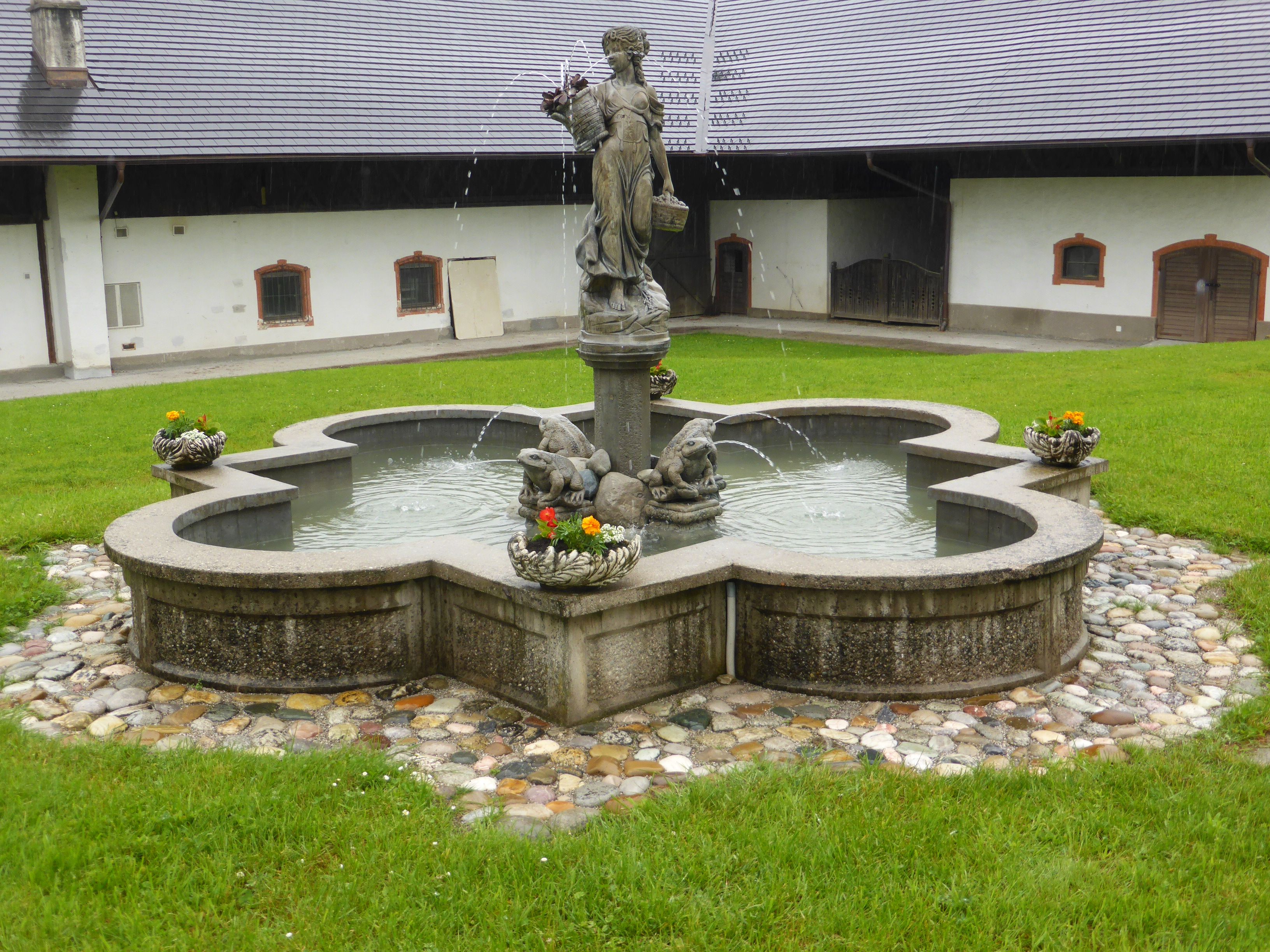 Pfarrhof / Dechanthof in St. Georgen bei Salzburg